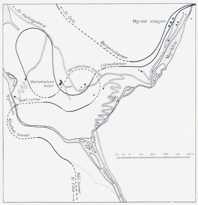 Tunnelene rundt Myrdal stasjon, der Bergensbanen og Flåmsbanen møtes. Fra Just Broch: «Av Norges statsbaners historie 5: Jernbaneplanen av 1908: Dovrebanen» (1938), s. 122.